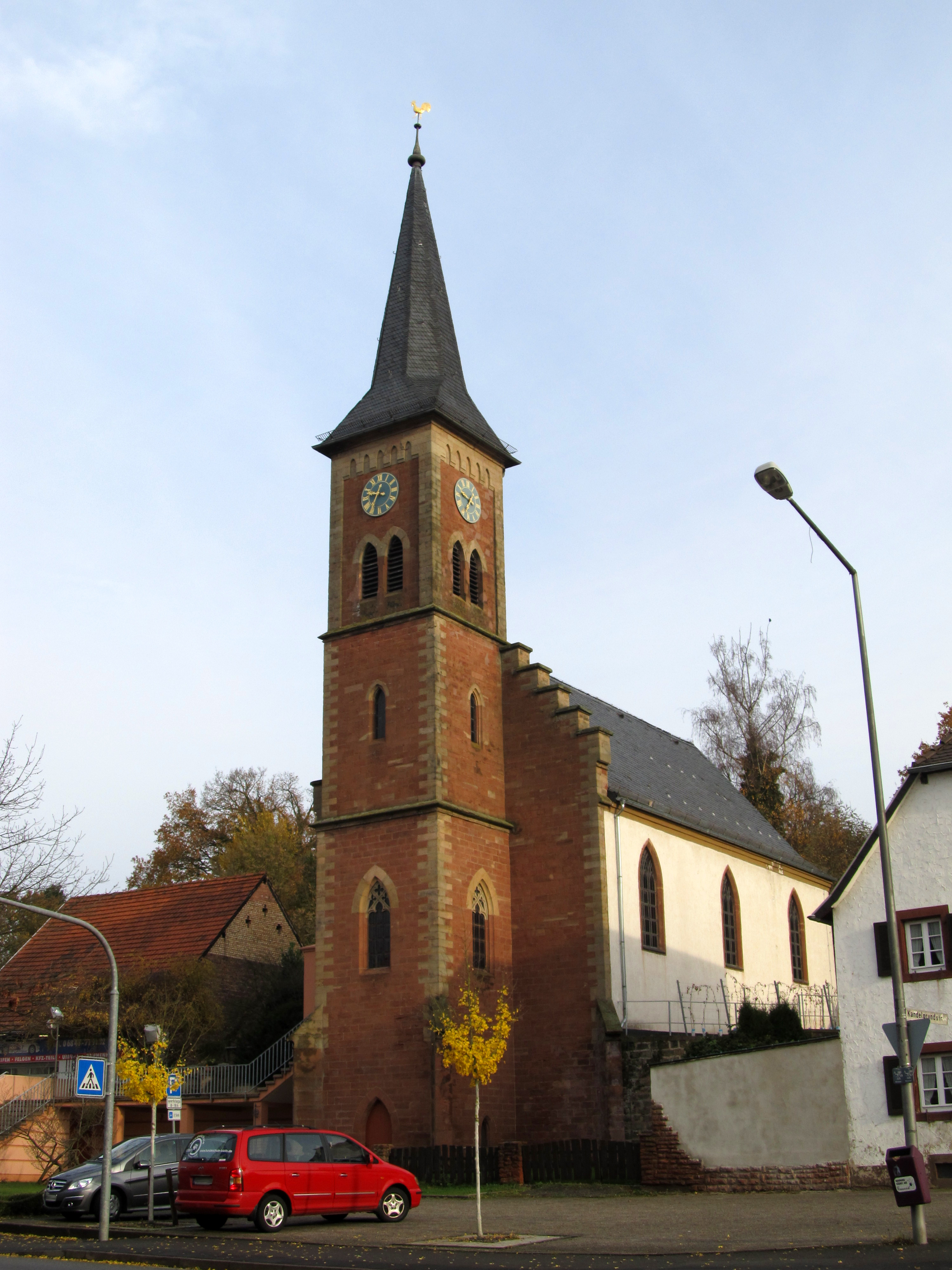 Die protestantische Apostelkirche in Einöd, einem Stadtteil von Homburg, Saarland